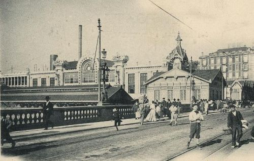 Areatzako zubia eta desagertutako Portugaleterako geltokia